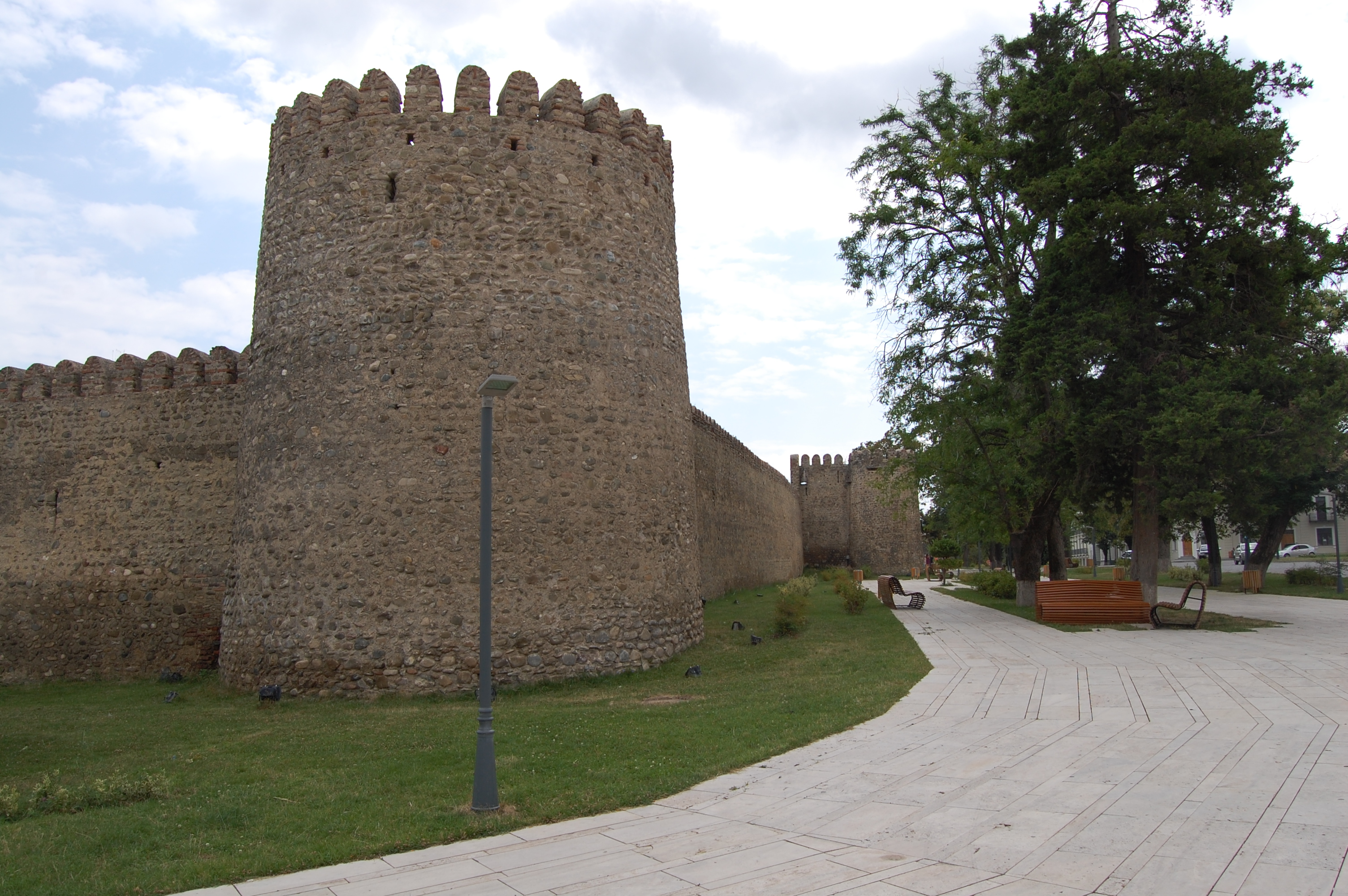 Telavi - Fortress Georgia - Sakartvelo